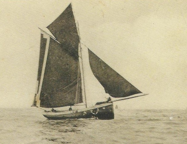 Barque de pêche traditionnelle de l'Île de Sein (début XXème siècle)